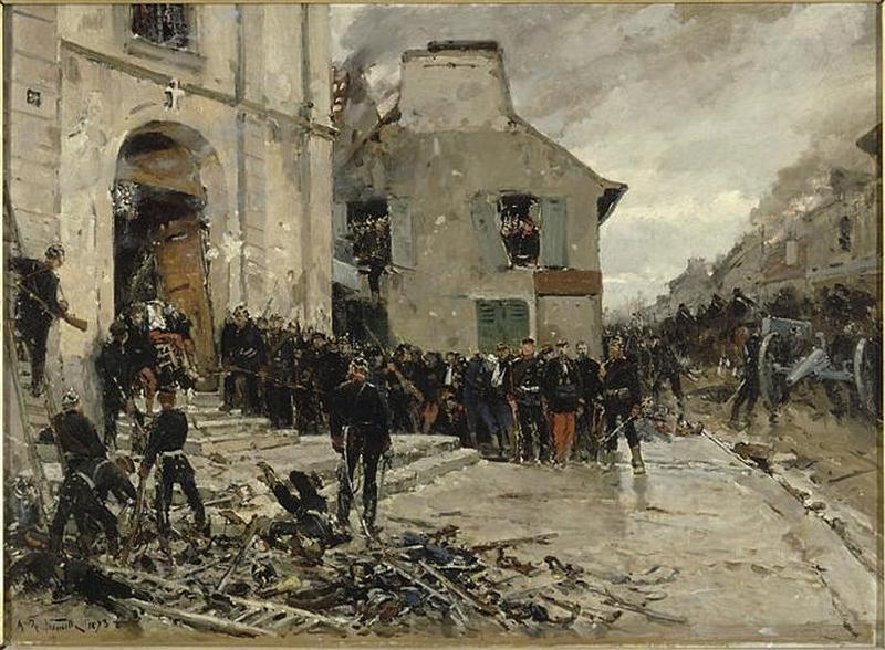 Tableau de 1878 d'Alphonse de Neuville. La défaite française lors de la première bataille du Bourget. Les troupes françaises s'étaient réfugiées pour une part dans l'église Saint-Nicolas lors de la contre-attaque allemande du 30 octobre 1870.